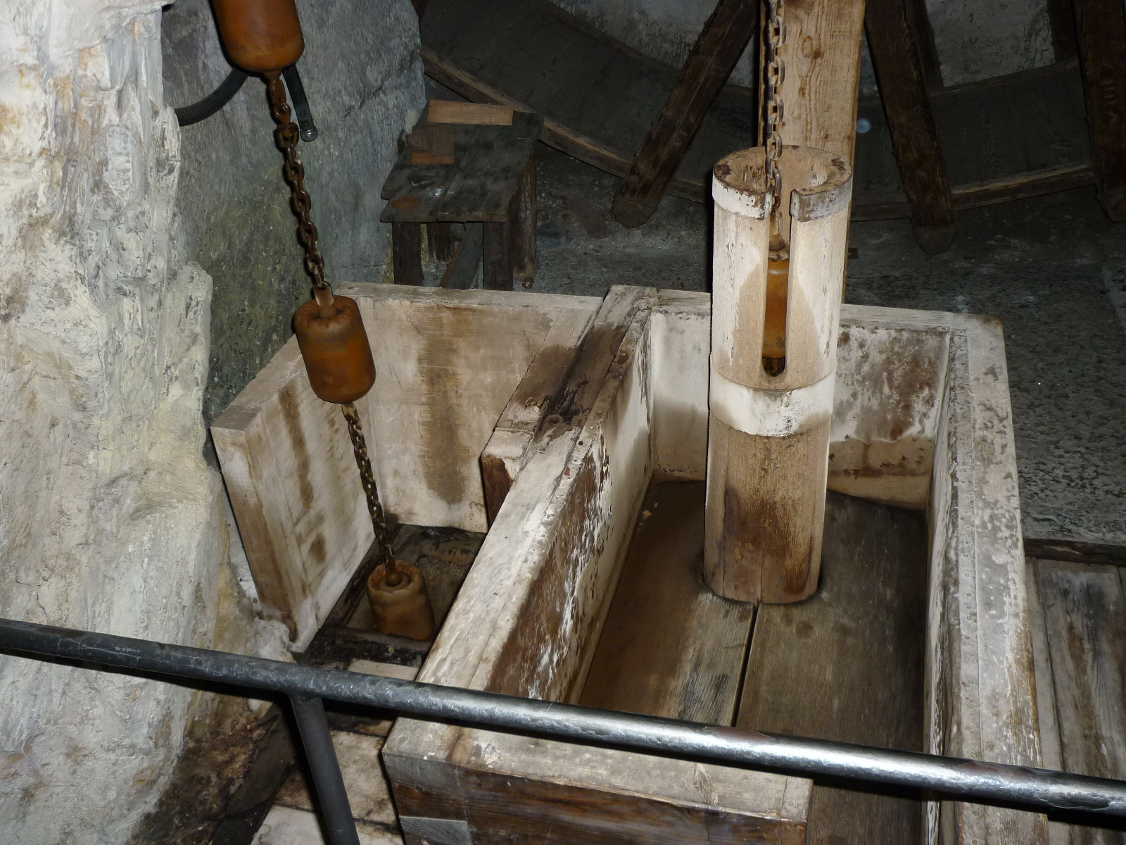 Heinzenkunst. Nachbau im Deutschen Museum München, Abteilung Bergbau